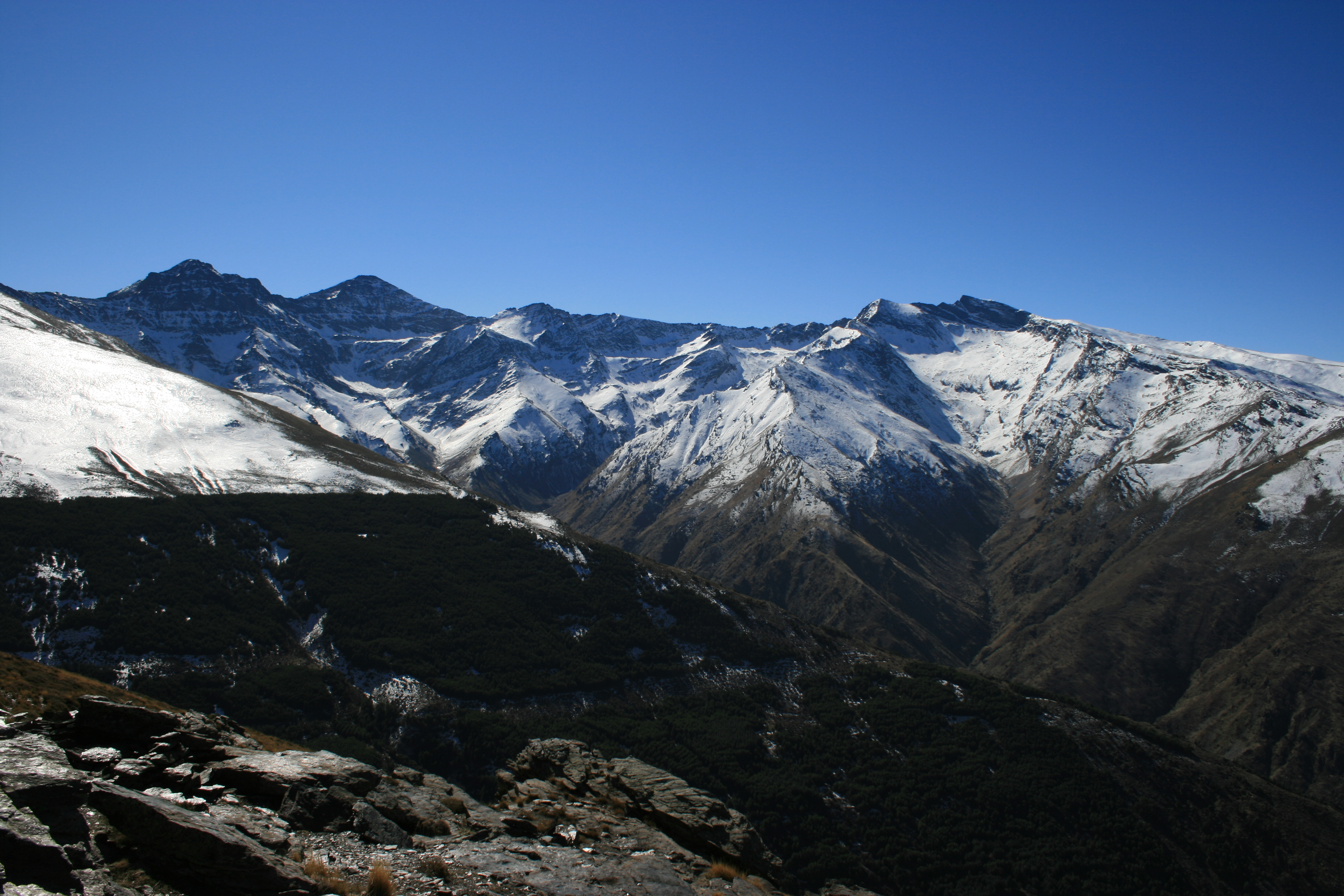 En Sierra Nevada, desde el Mulhacén (segunda cima contando desde la izquierda de la foto) desciende el río Valdecasillas, que poco después por su izquierda recibe al río Valdeinfierno, formando ambos el río Real, el cual poco después, también por su izquierda, recibe al río Guarnón, que vemos cómo se despeña desde el Corral del Veleta, dando lugar al río Genil, que luego será el principal afluente del Guadalquivir. En la fotografía, en primer término aparece la repoblación forestal de la Cuesta del Calvario, que separa al Genil de su primer afluente por la derecha, el Río Vadillo.